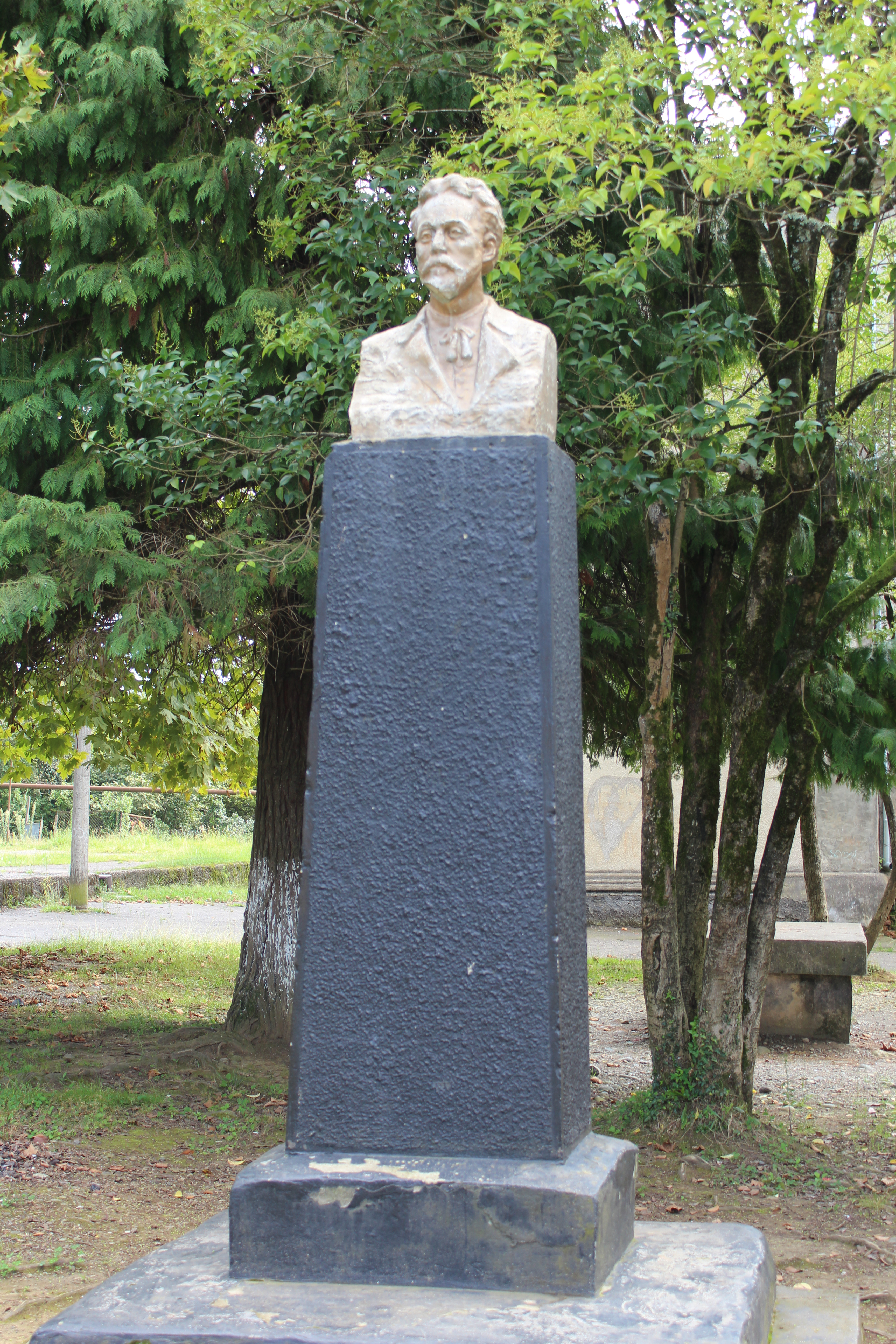 ეგნატე ნინოშვილის ბიუსტი მისივე სახელობის სკოლის ეზოში